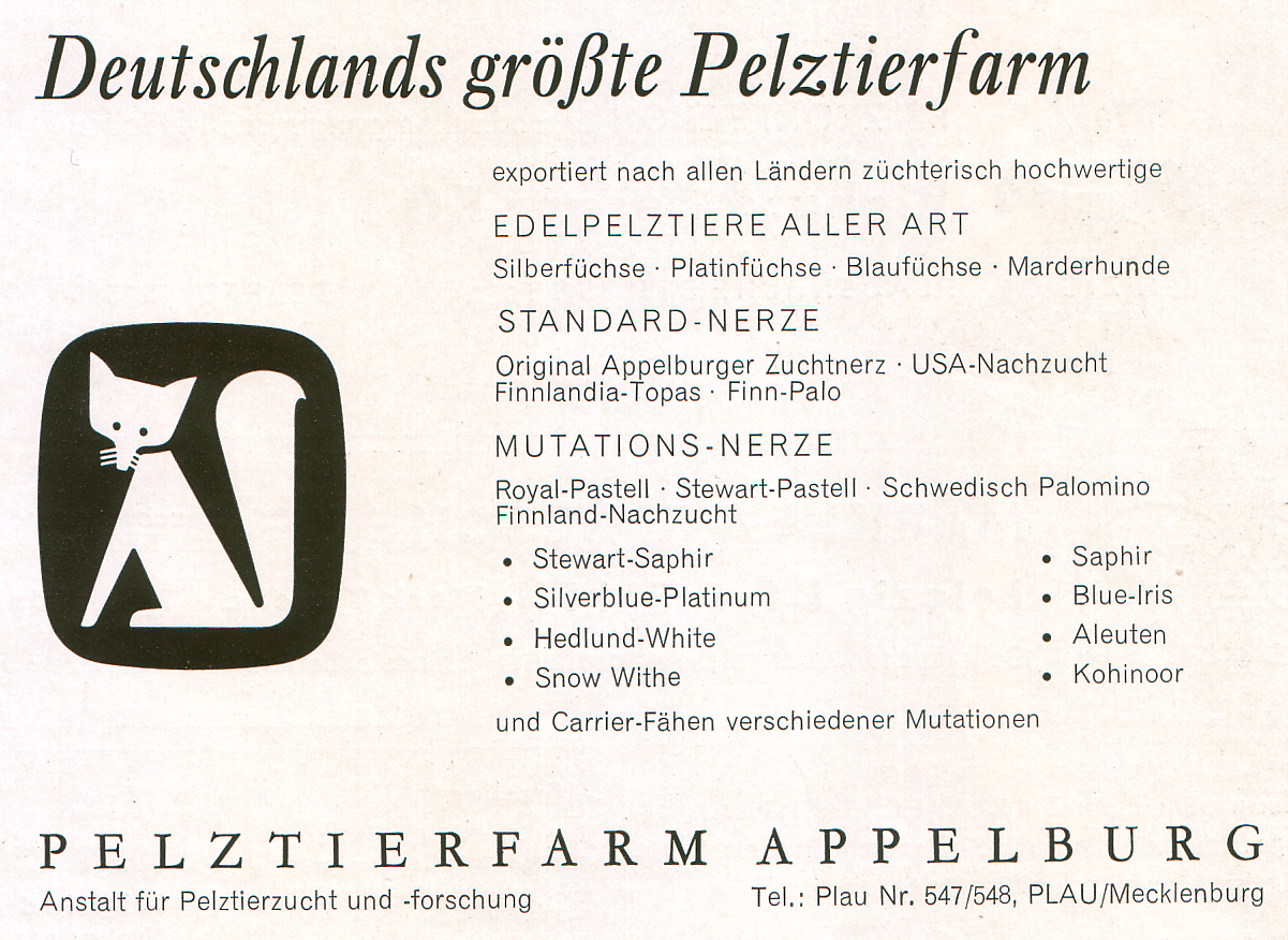 Pelztierfarm Appelburg, Deutschlands größte Pelztierfarm, Anzeige Januar 1964.